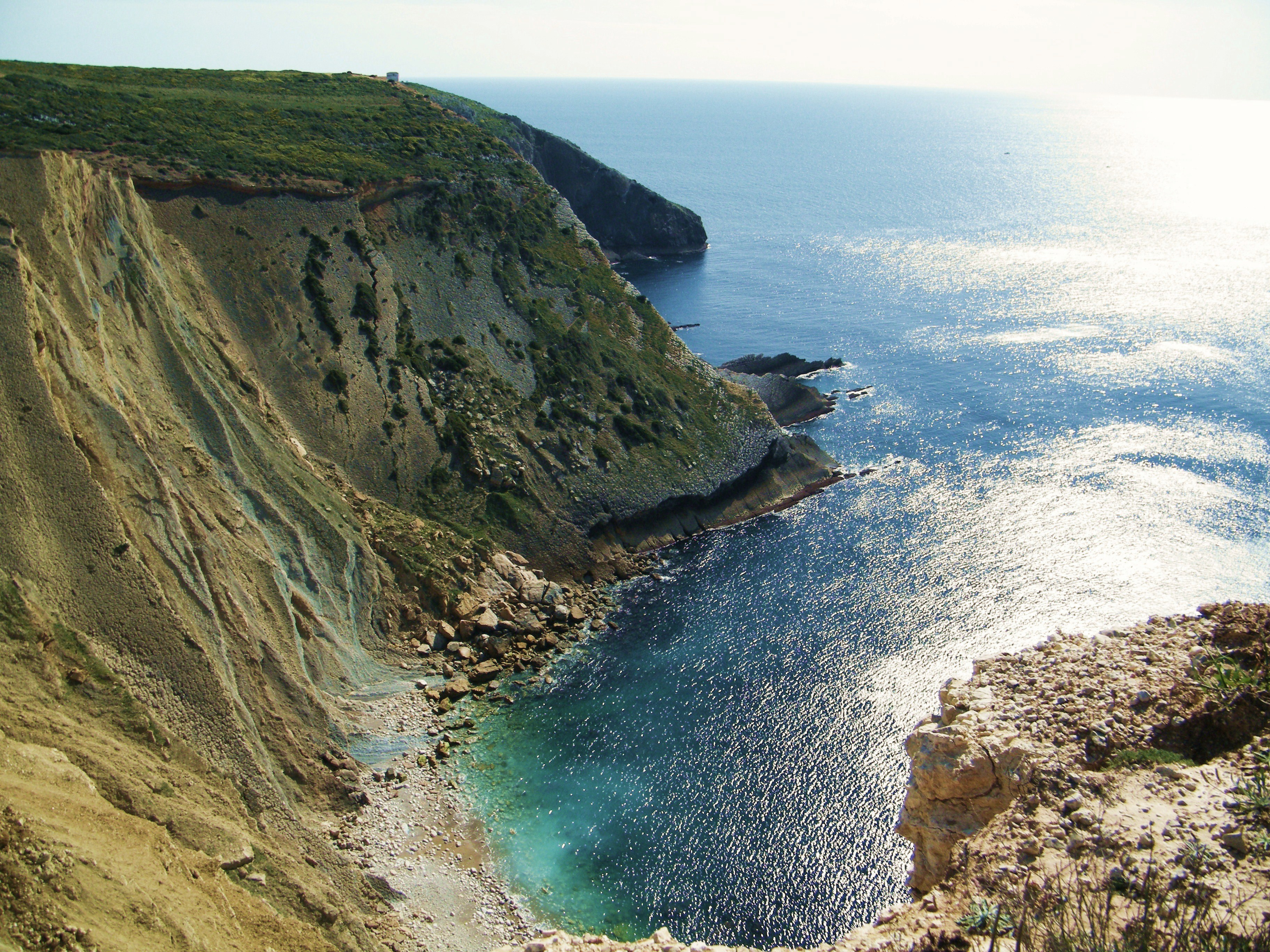 Monumento Natural da Pedra da Mua